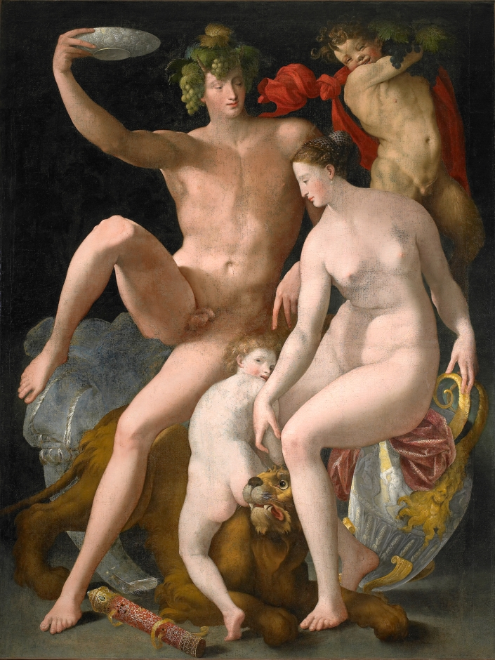 Rosso fiorentino (attr.), bacco, venere e marte